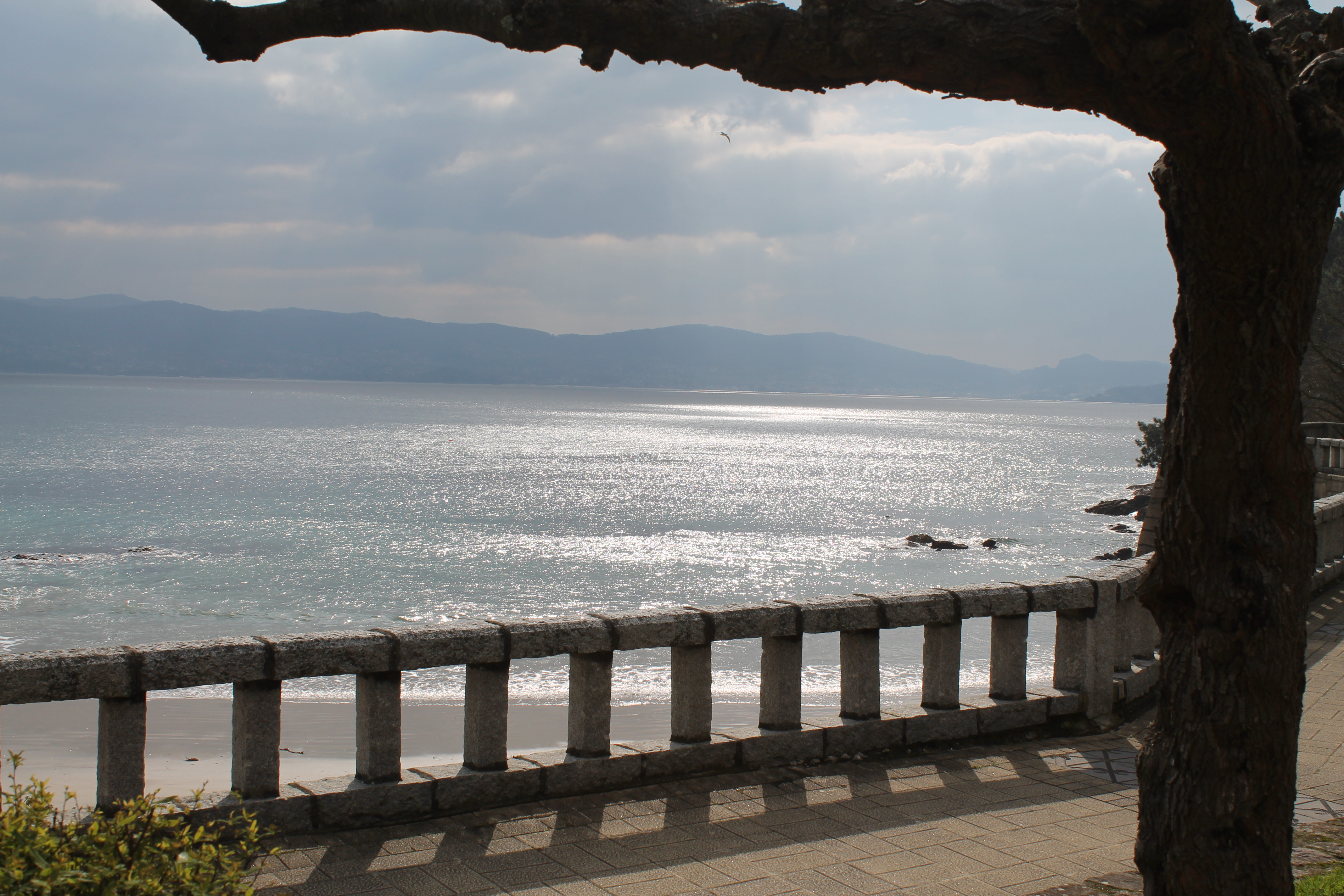 Vistas dende Sanxenxo